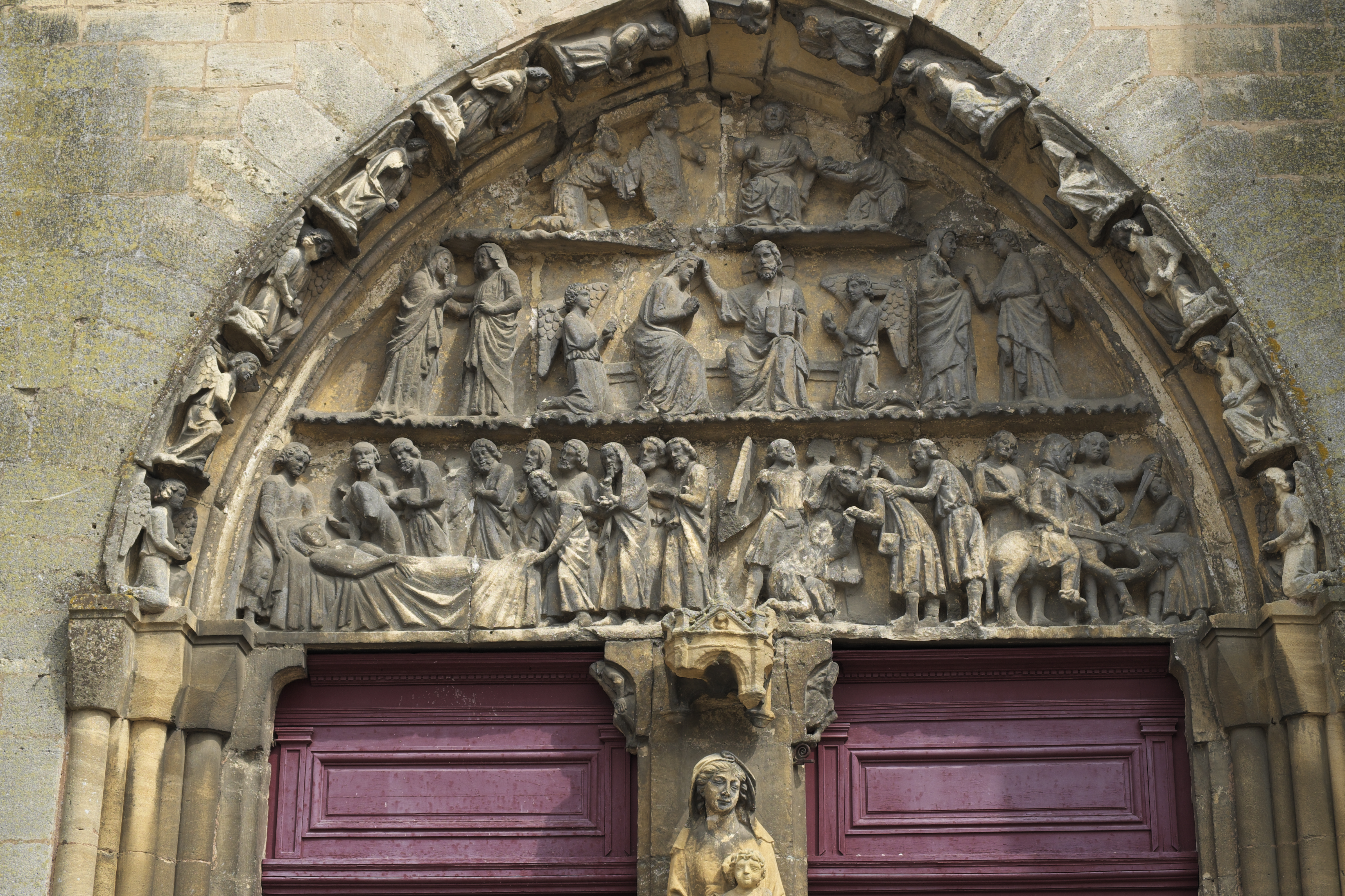 Ehemalige Abteikirche Notre-Dame in Mouzon im Département Ardennes (Région Champagne-Ardenne/Frankreich), Tympanum des Hauptportals